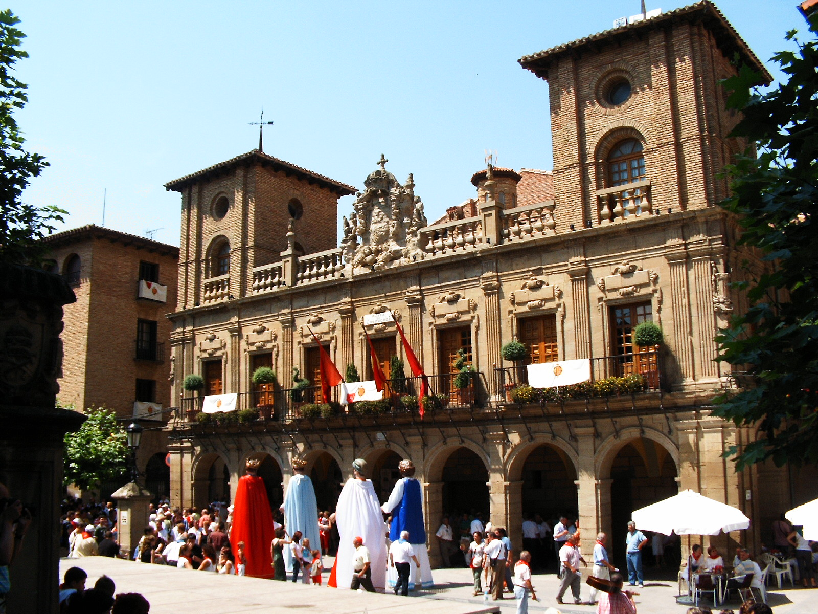 Ayuntamiento de Viana, en Navarra (España). Desfile de gigantes y cabezudos.